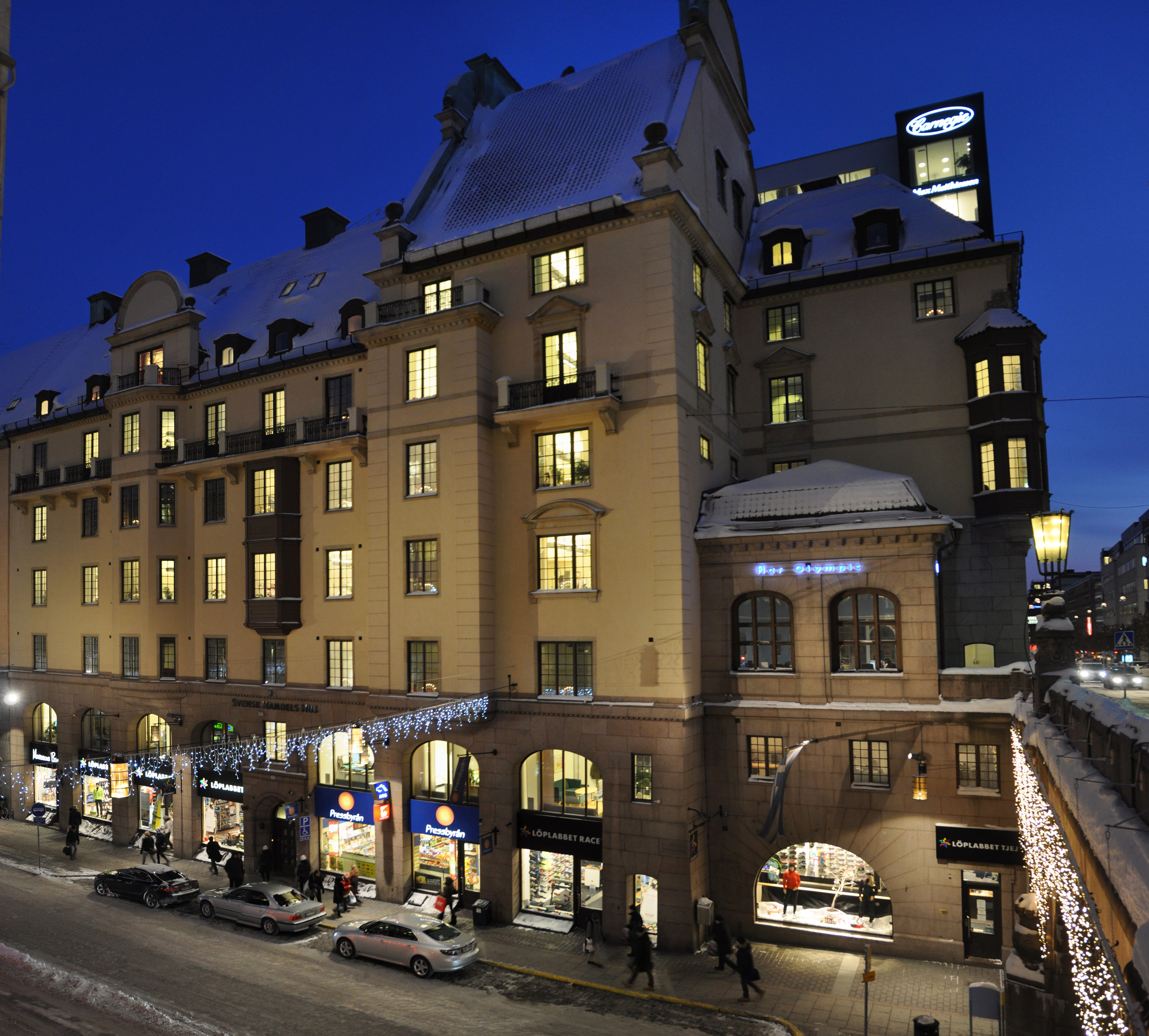 Bocken 25, Kungsgatan 19, 21, Regeringsgatan 58. Byggnadsår 1912-14, arkitekt Gustaf de Frumerie & Kristian Sundstrand